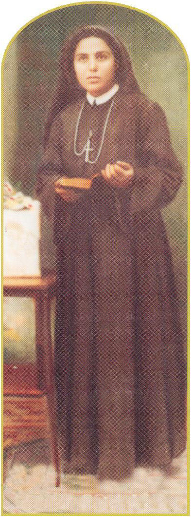 Suor Maria Francesca Giannetto (foto)